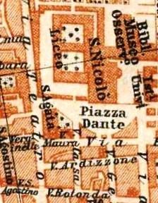 Catania Map